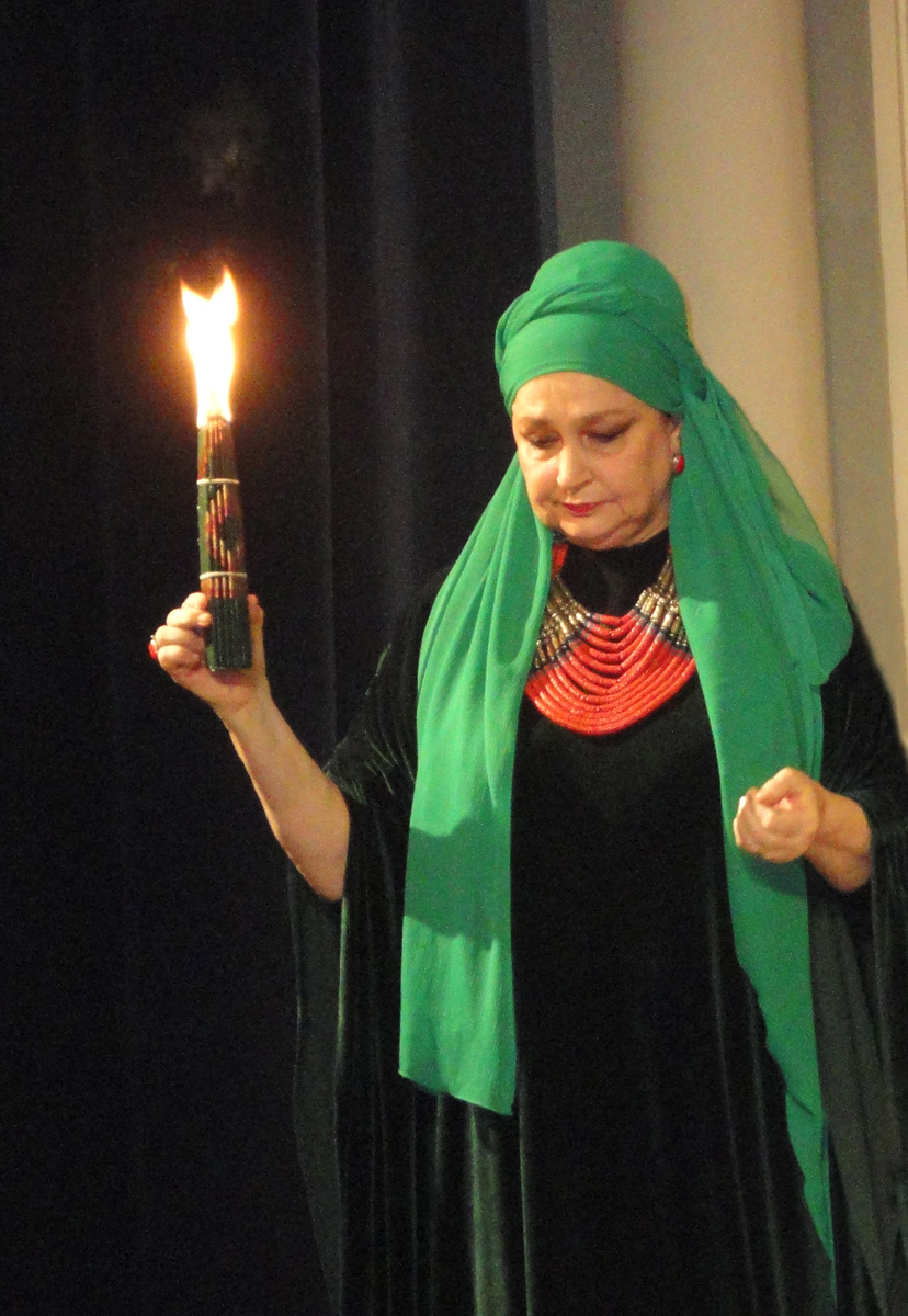 Р. С. Недашківська виконує композицію пам’яті "Небесної сотні" в Будинку актора. Київ, 2014